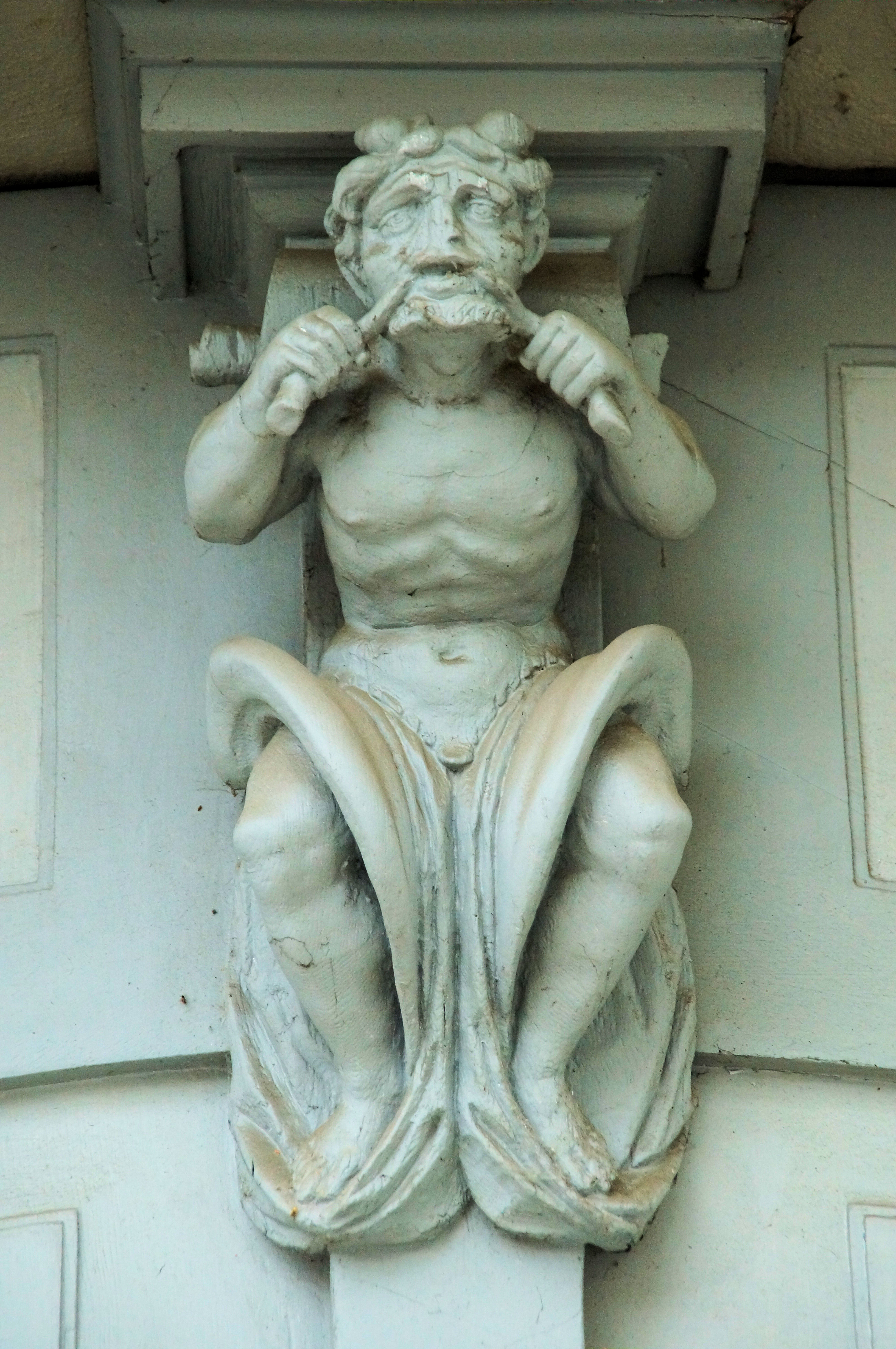 Ehem. Deutschordenskomturei, Skulptur am PortalThis is a photograph of an architectural monument.